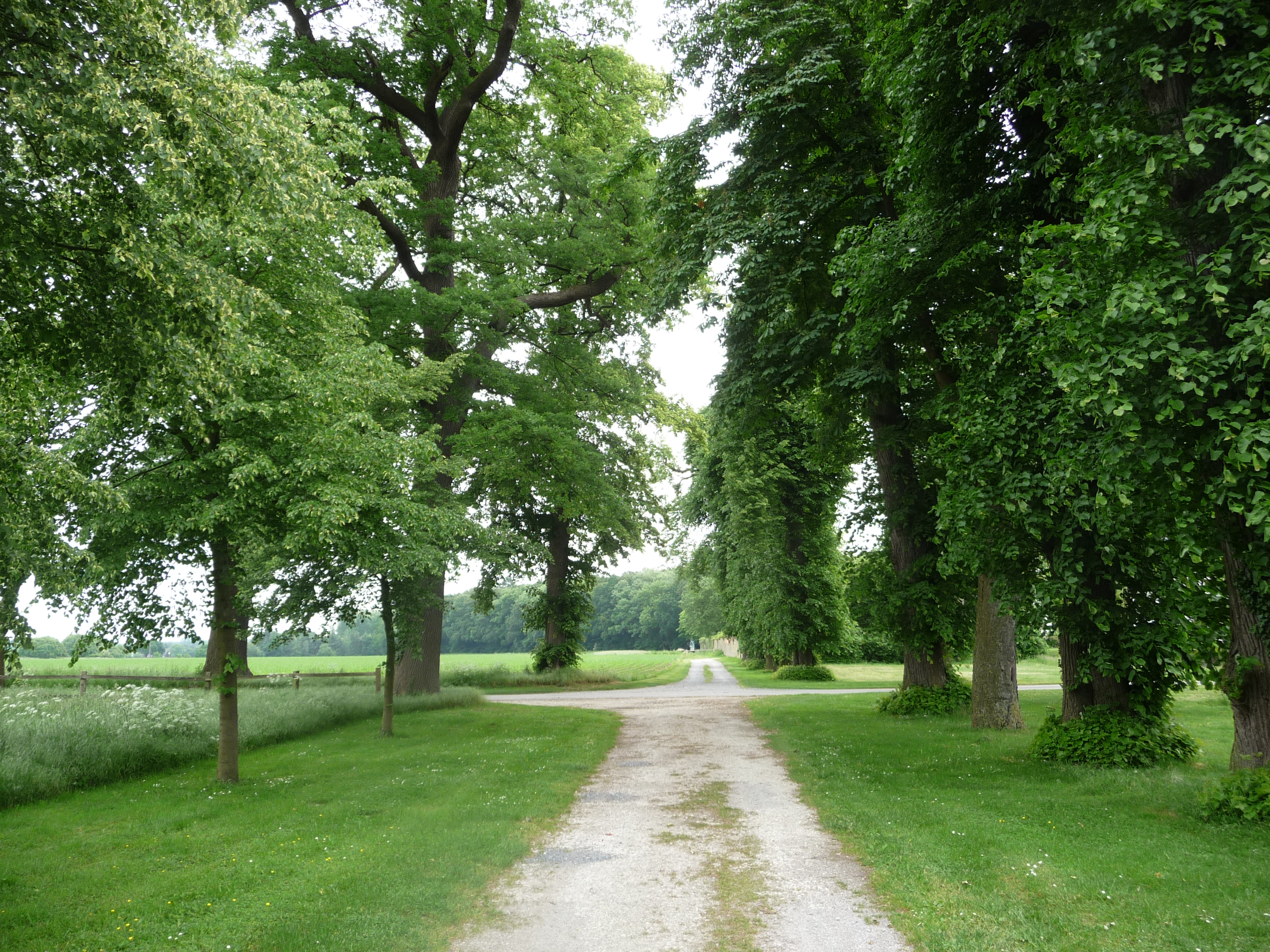 Kurz vor dem Ortseingang zu Melle befindet sich dieses zweigeteilte Landschaftsschutzgebiet, welches Wälder, Teiche, Kanäle und Wiesen bietet. Zwischen beiden Teilen liegt das ehemalige Fürstentum Osnabrück. Hier: der Teil Richtung Melle.